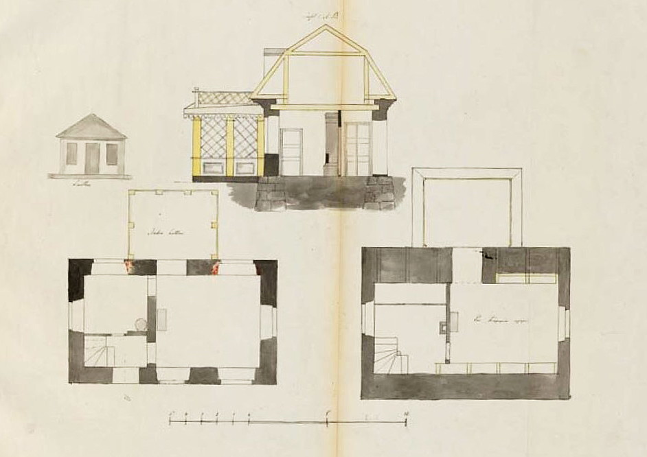 Ritning till tillbyggnad av befintligt stenhus med glasveranda och förändring av fönster samt ändring av kök till bostadsrum. Sektion, bottenplan och vindsplan, hus 1. Fasad lusthus. BNA 1860:439, Bygglovshandlingar, SSA.